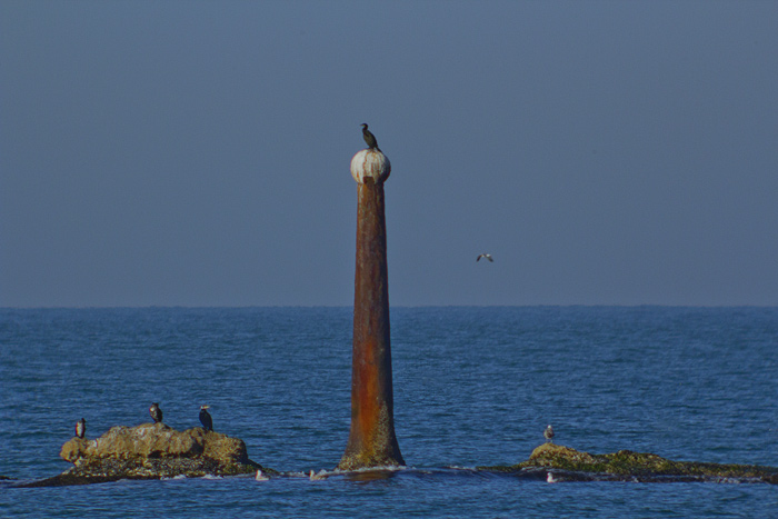 formación rocosa cercana a la playa de San Antonio de Cullera